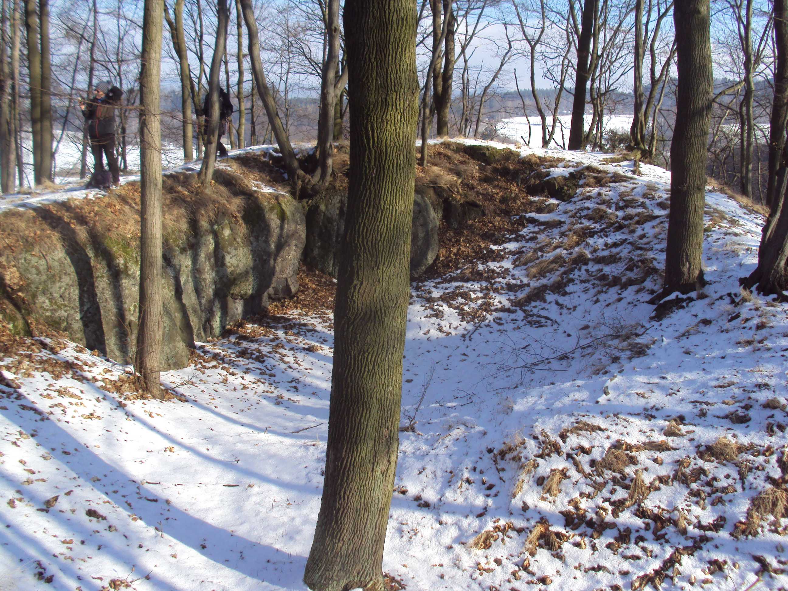 Zde stával Pihelský hrádek